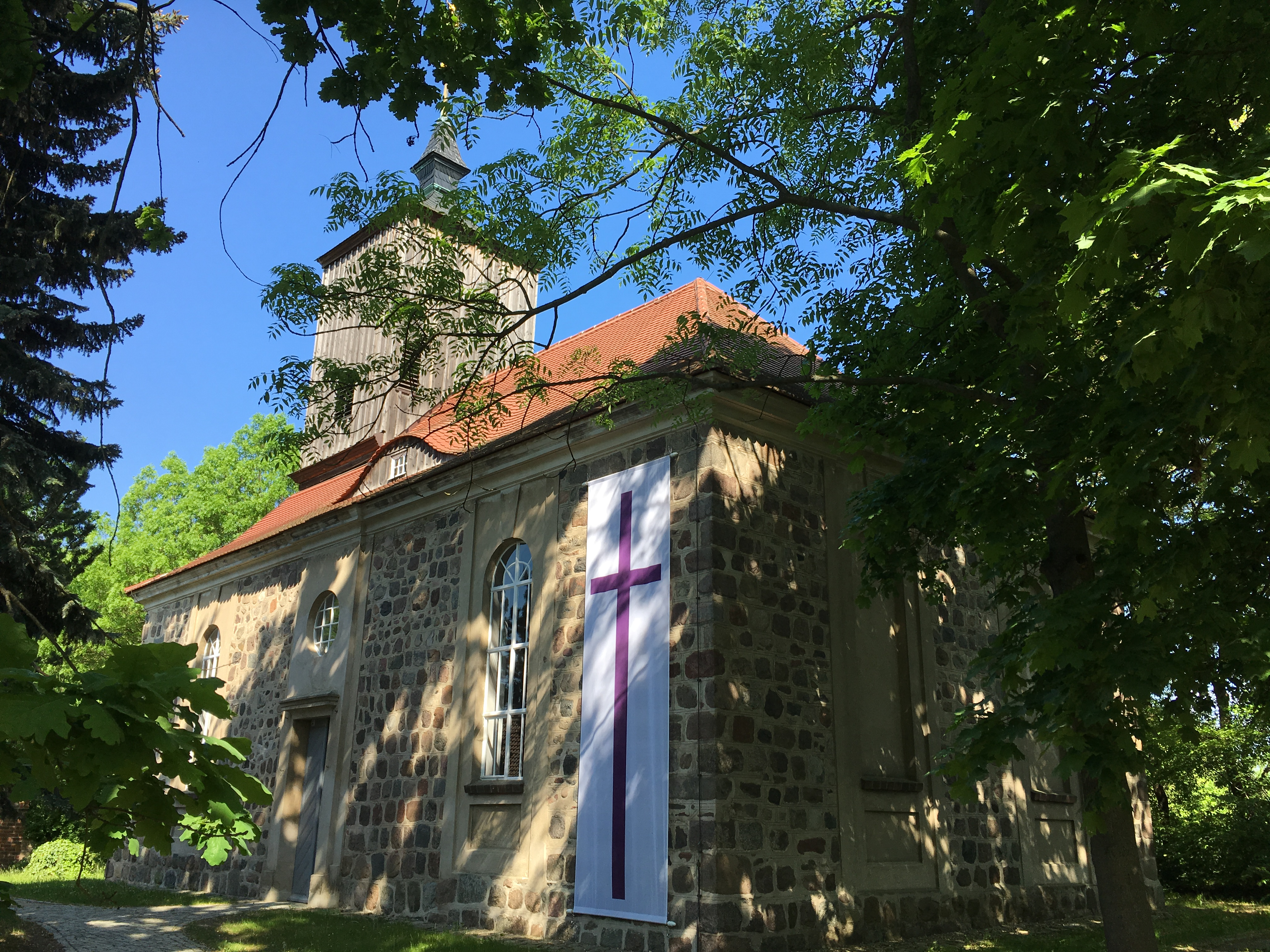 Die Dorfkirche in Mahlow ist eine Saalkirche aus der zweiten Hälfte des 13. Jahrhunderts. Sie wurde in den Jahre 1755 und 1758 erheblich umgestaltet. Im Innern stehen unter anderem ein Kanzelaltar mit dem Monogramm FR von Friedrich II..